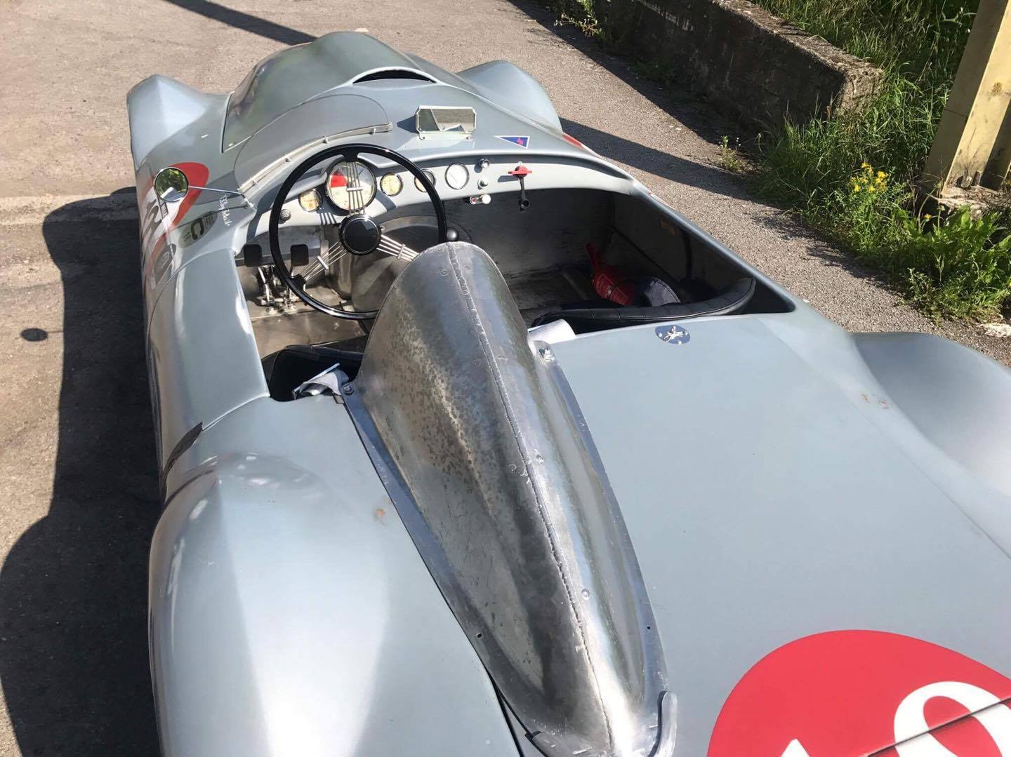 De Wagner BMW 328 Spezial (2017)